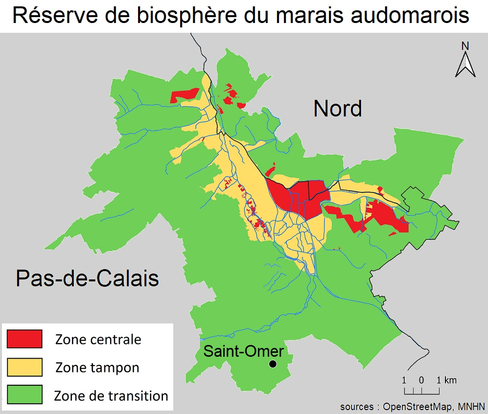 Carte de la surface totale de la réserve de biosphère du Marais Audomarois